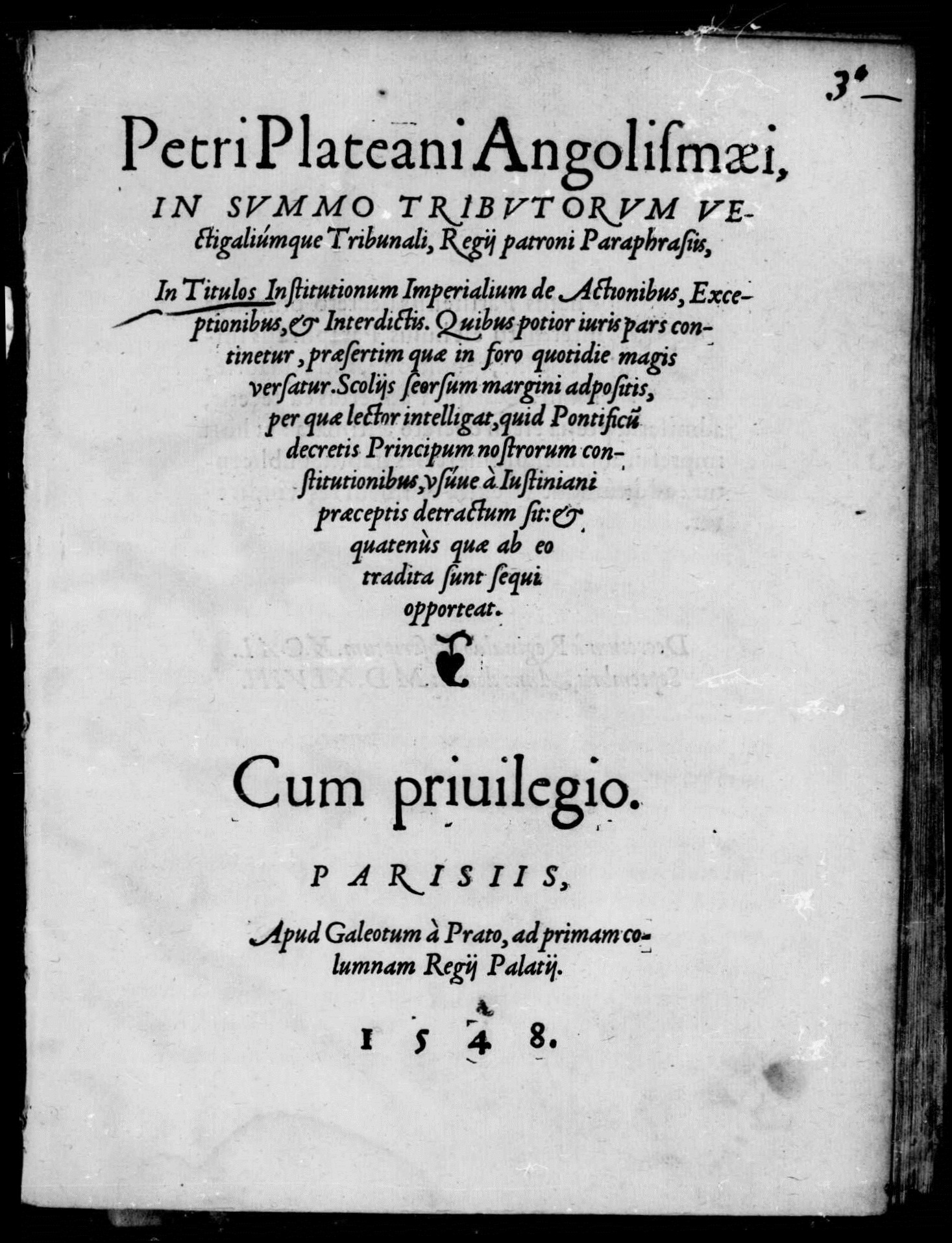 Frontespizio